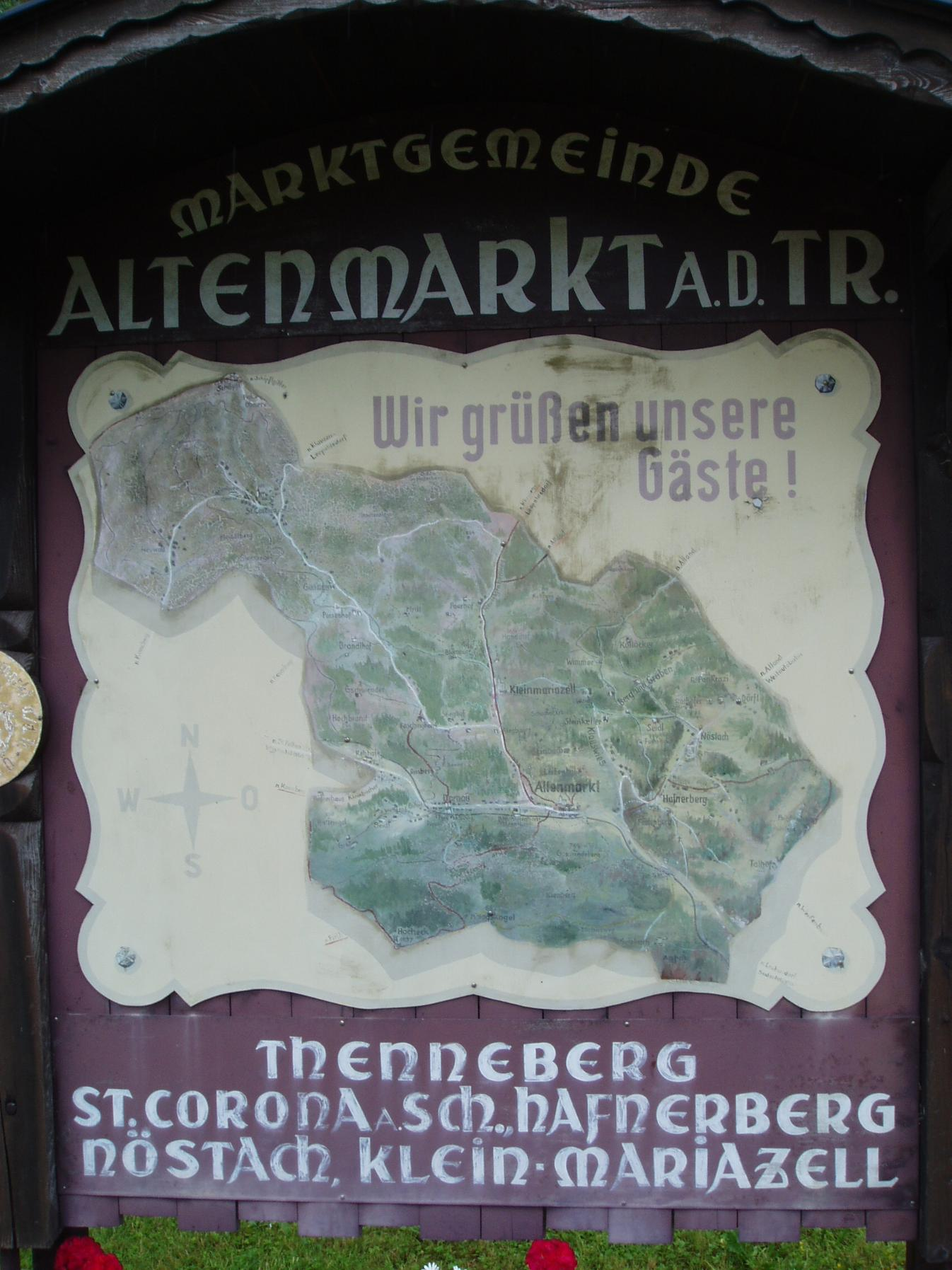 Foto vom 22.Juni 2005 von mir selbst.